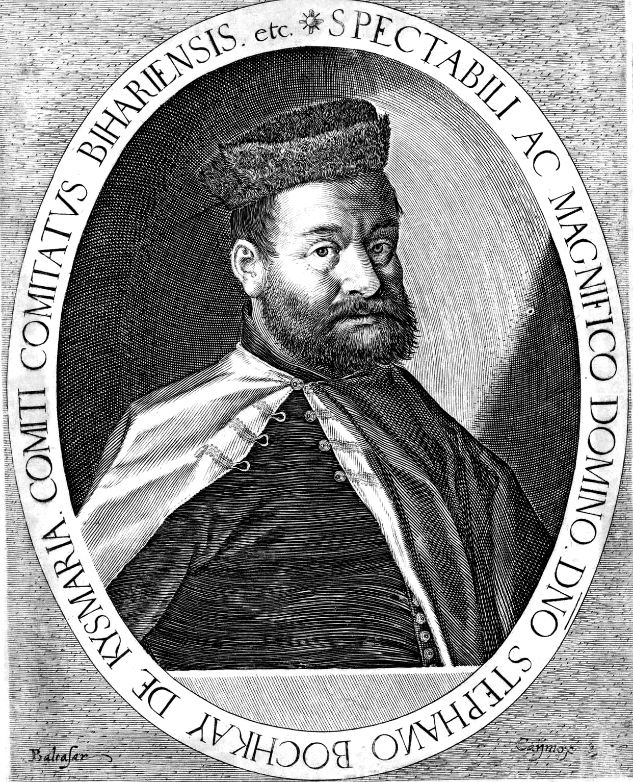 Stephen Bocskai